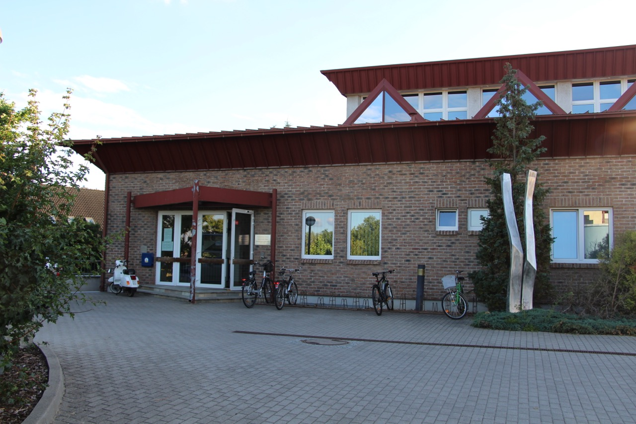 Eingang zum Sportkomplex des 1. LSC im Fliederweg 1 in Luckenwalde